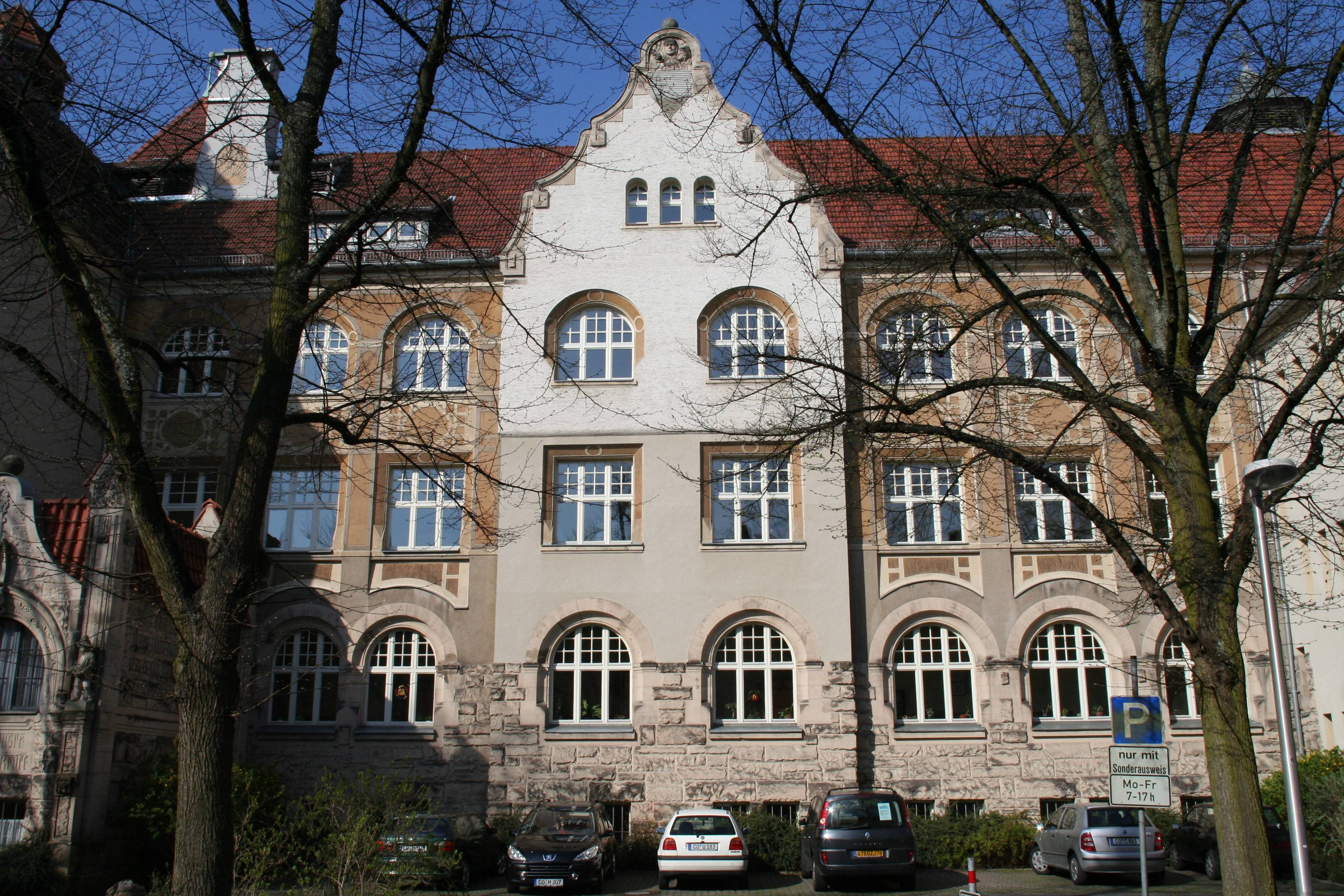 Coburg, Schleifanger 1, Heiligkreuz-Volksschule, Hauptflügel